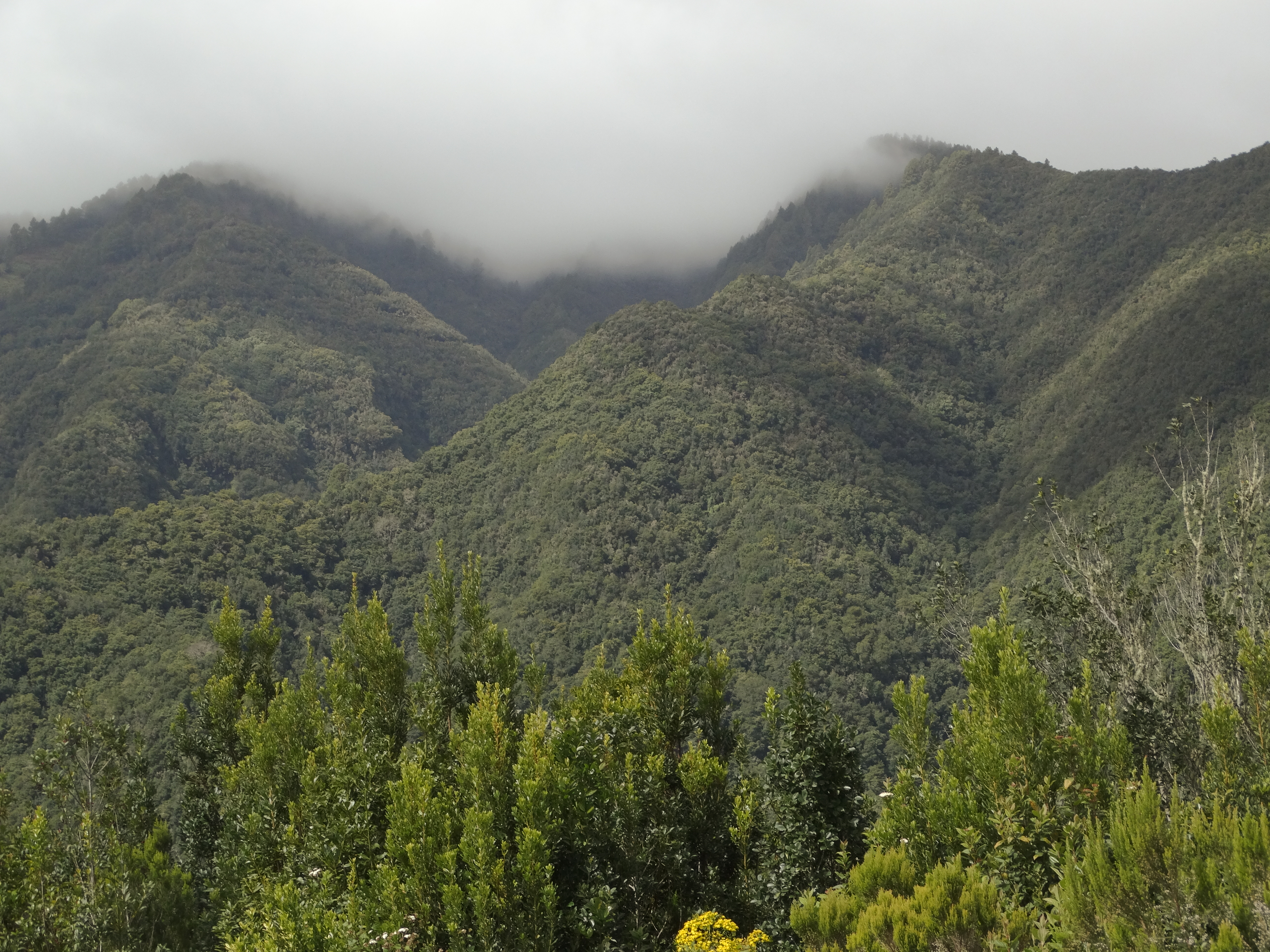 Vista del Cubo de la Galga al borde de la Caldera de Taburiente hacia el oeste This is a photography of a Special Area of Conservation in Spain with the ID: ES7020010. Natura2000 entry, EEA entry